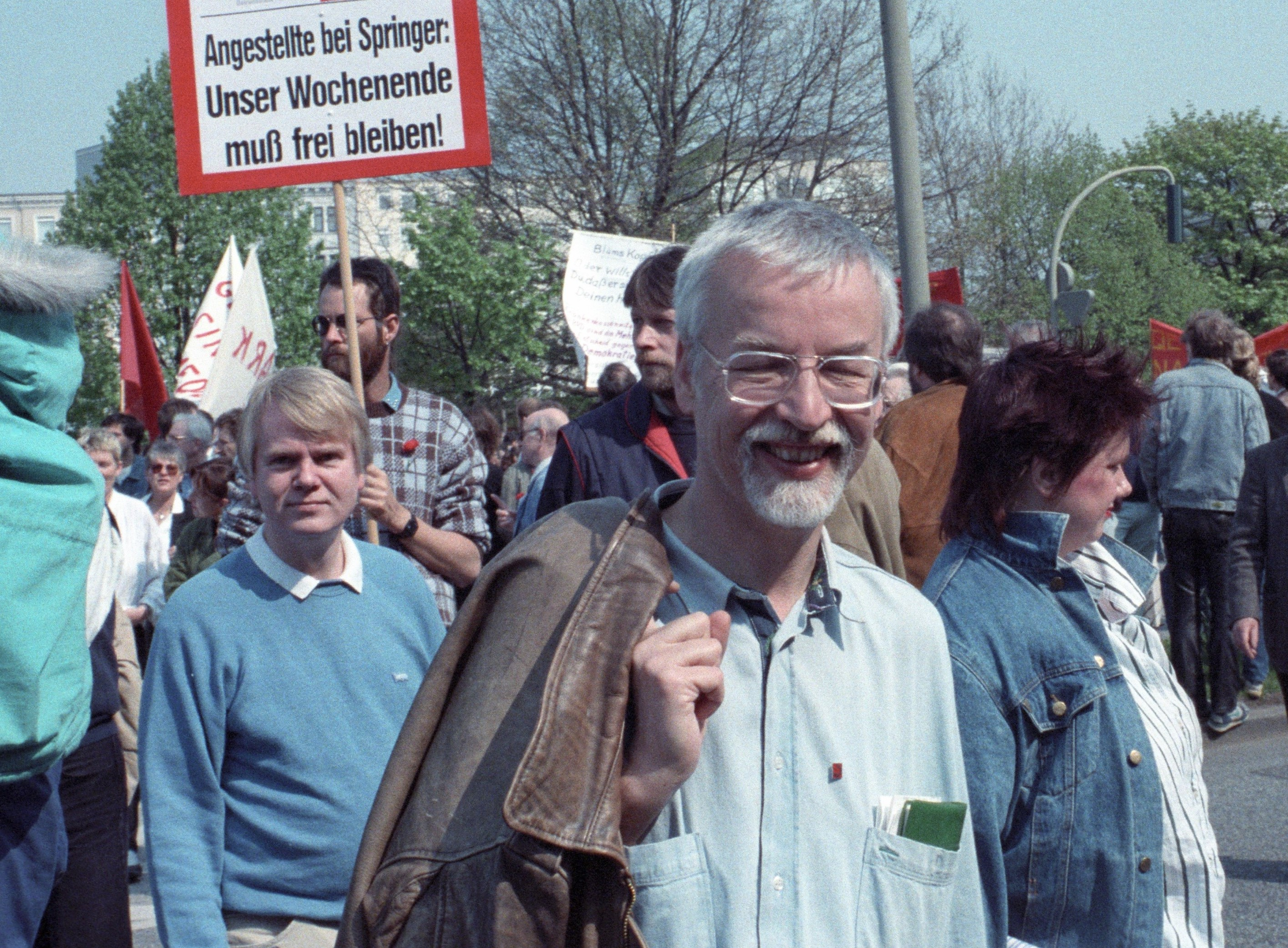 Journalist Volker Bräutigam auf einer Verdi-Demonstration in HAMBURG